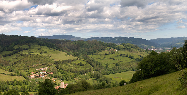 La imagen muestra una panorámica de la situación del pueblo de Villanueva de Grado, Asturias.